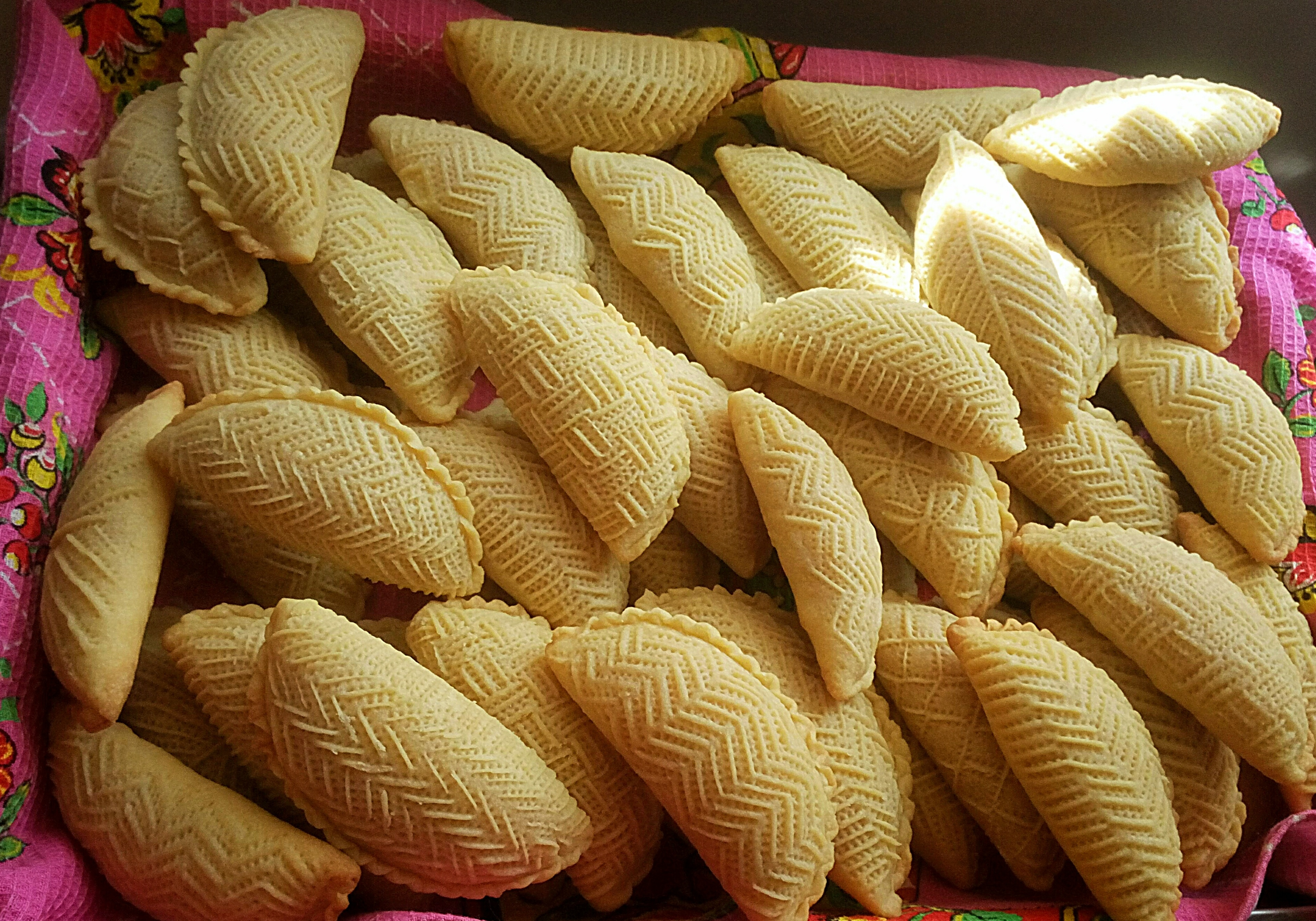 Azeri sweets